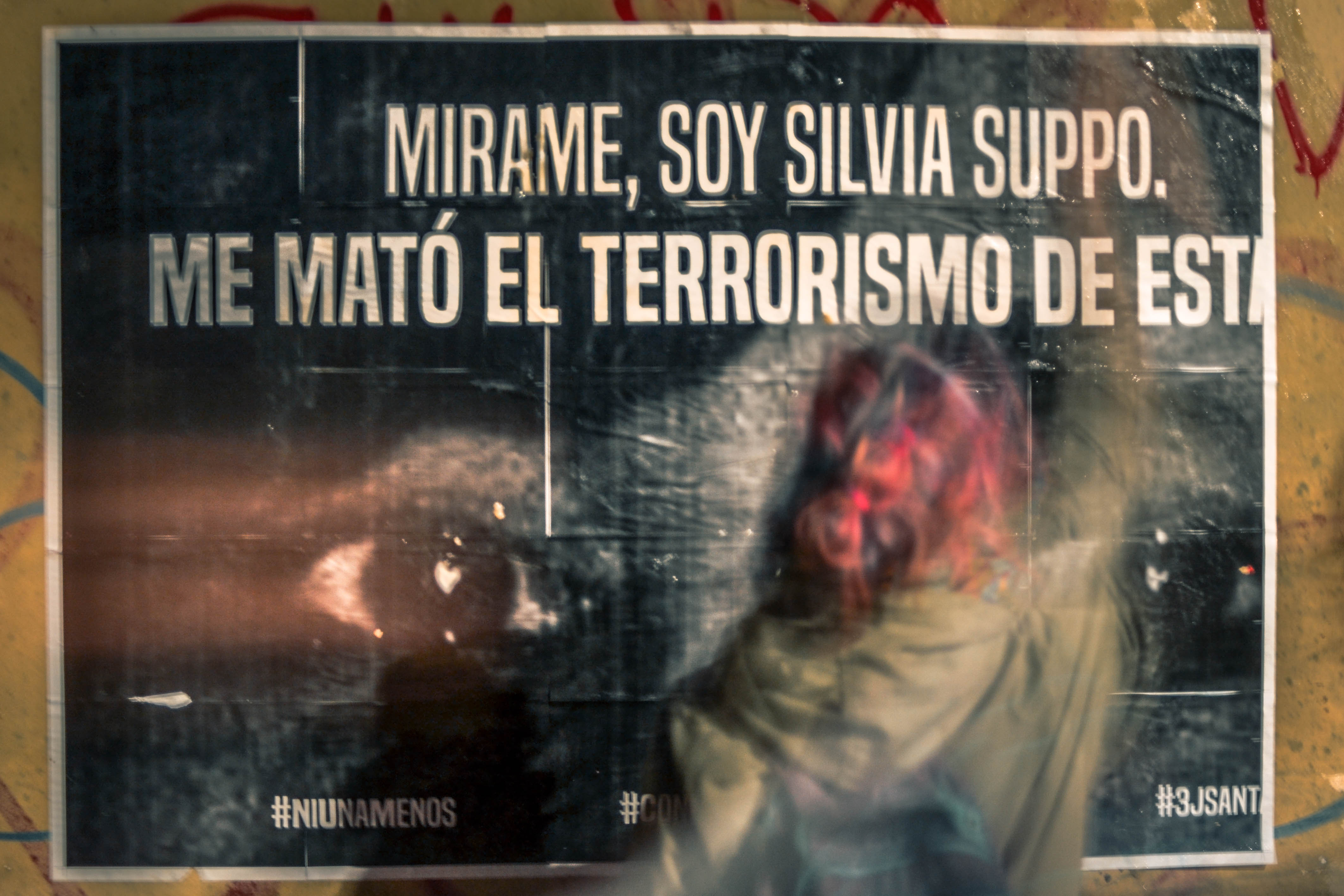 Pegatina 3j niunamenos fotografas feministas santa fe Argentina 2019